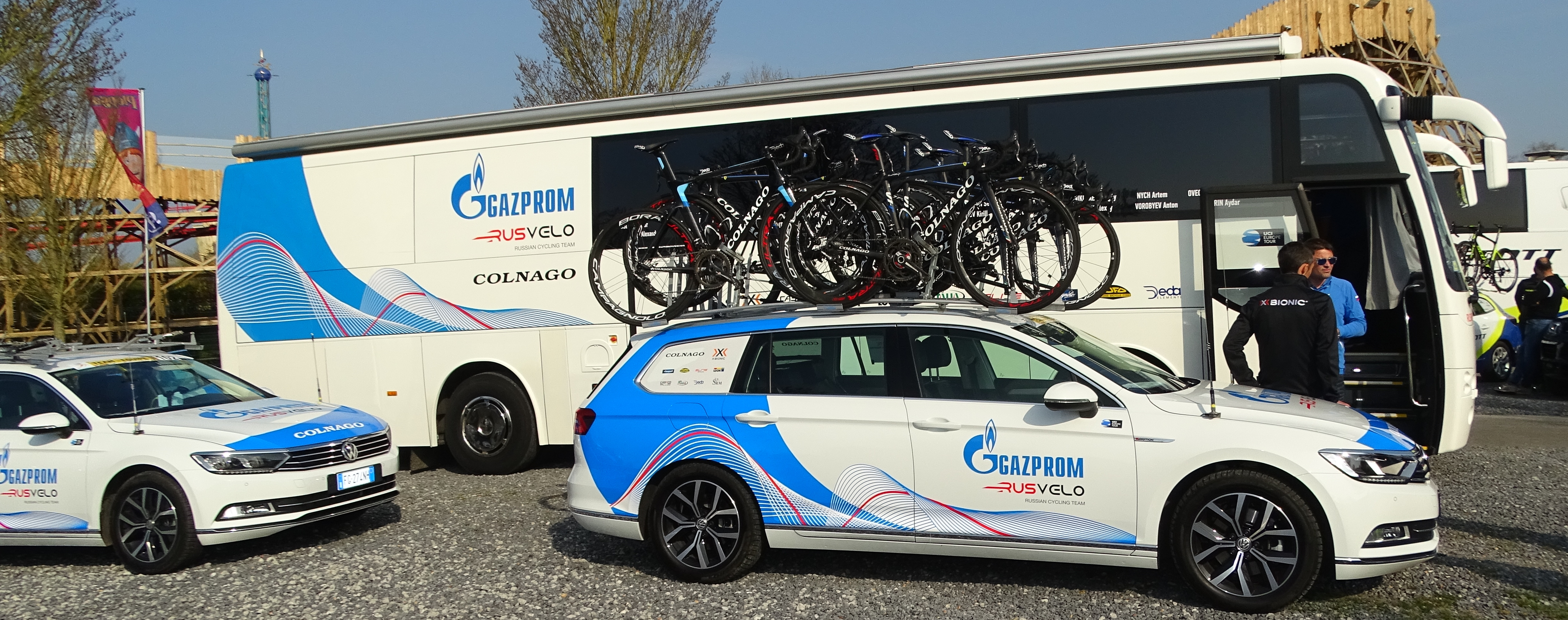 Reportage réalisé le mardi 28 mars à l'occasion de du départ de la première étape des Trois jours de La Panne 2017 à Adinkerque (La Panne), Belgique.